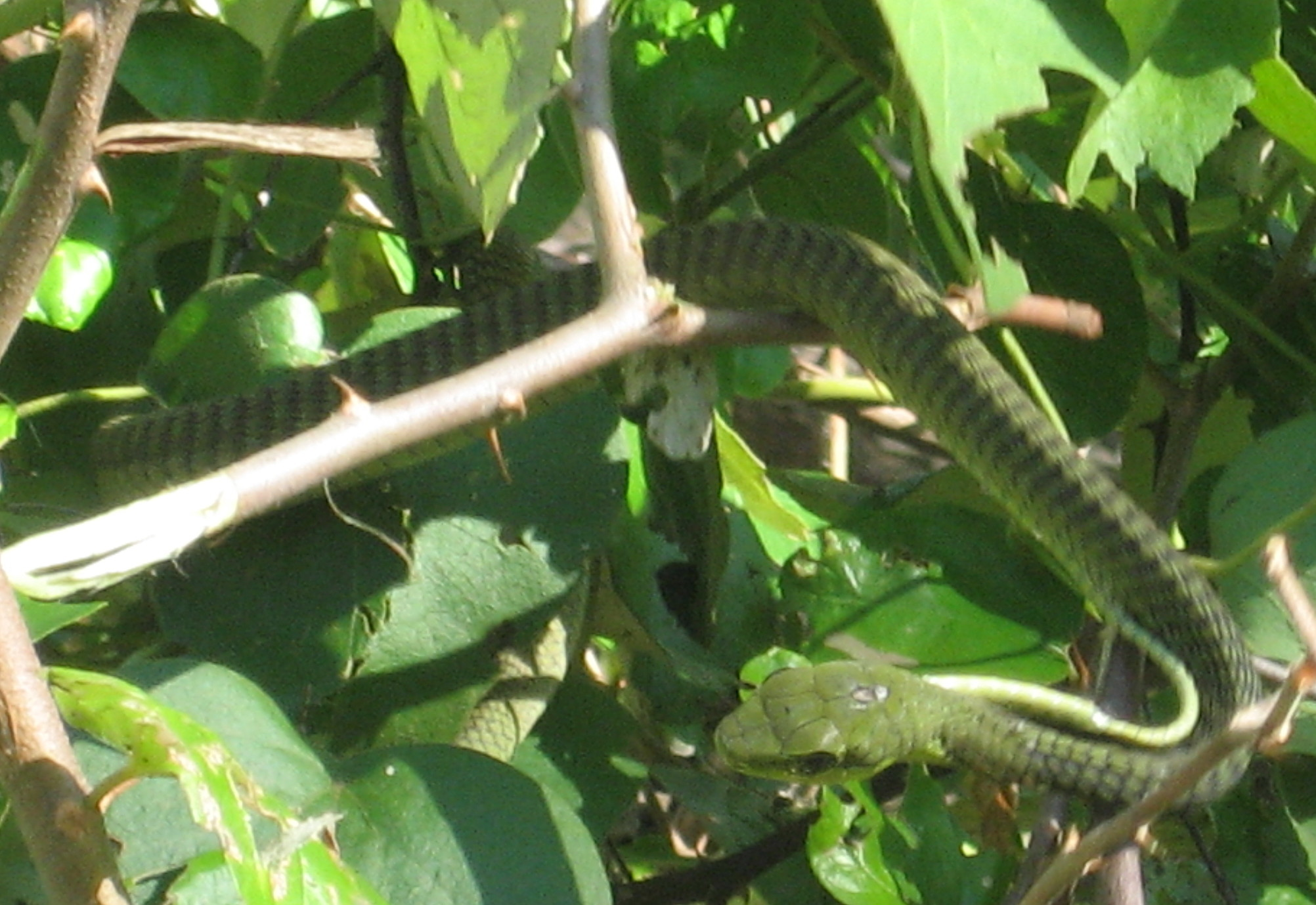 Boomslang